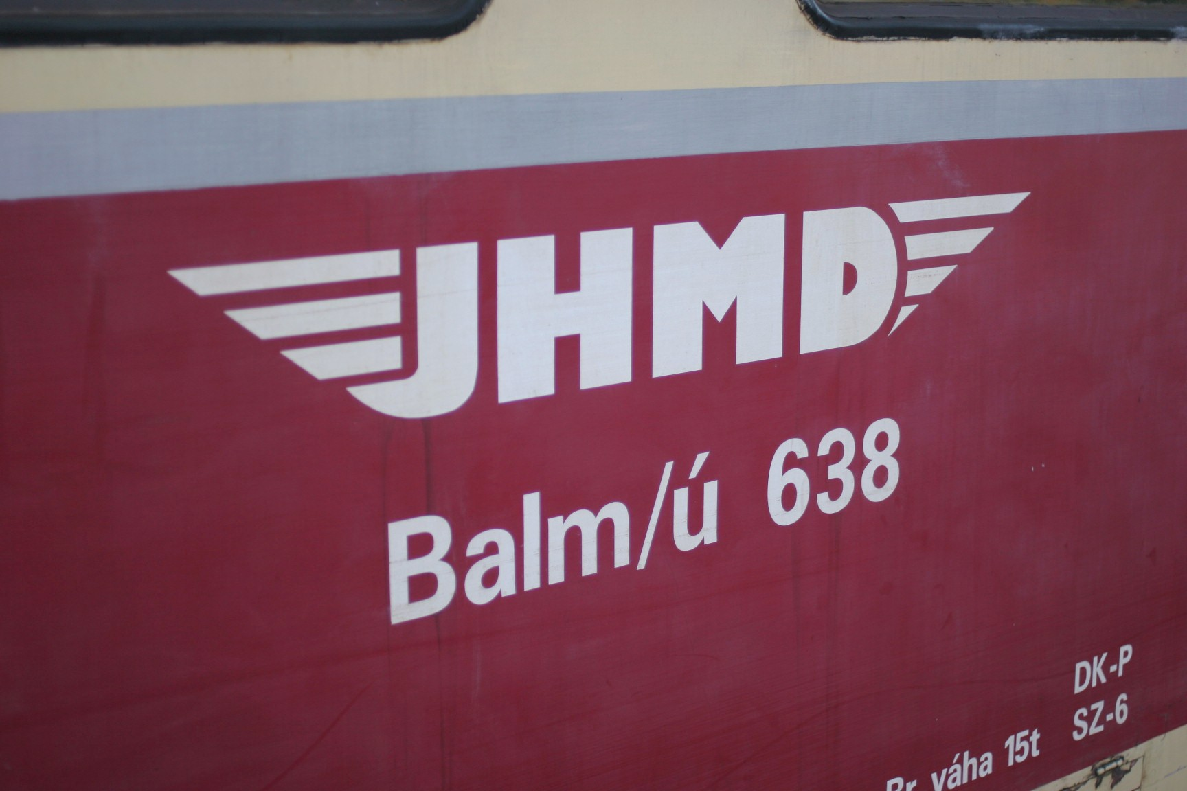 fsu